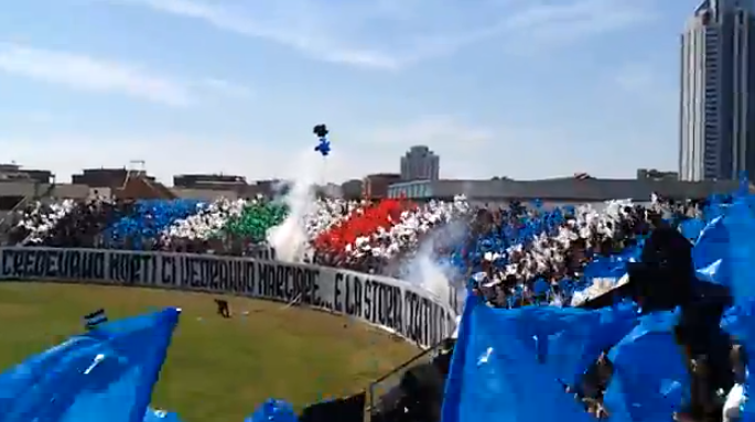 la curva nord dello stadio Domenico Francioni in una partita casalinga dell'US Latina